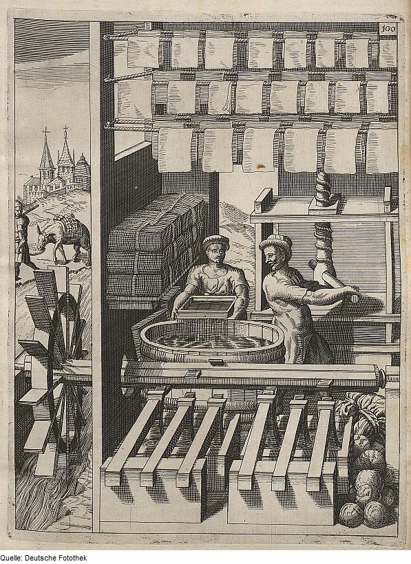 Original image description from the Deutsche Fotothek Mechanik & Mühle & Papiermühle & Wasserrad